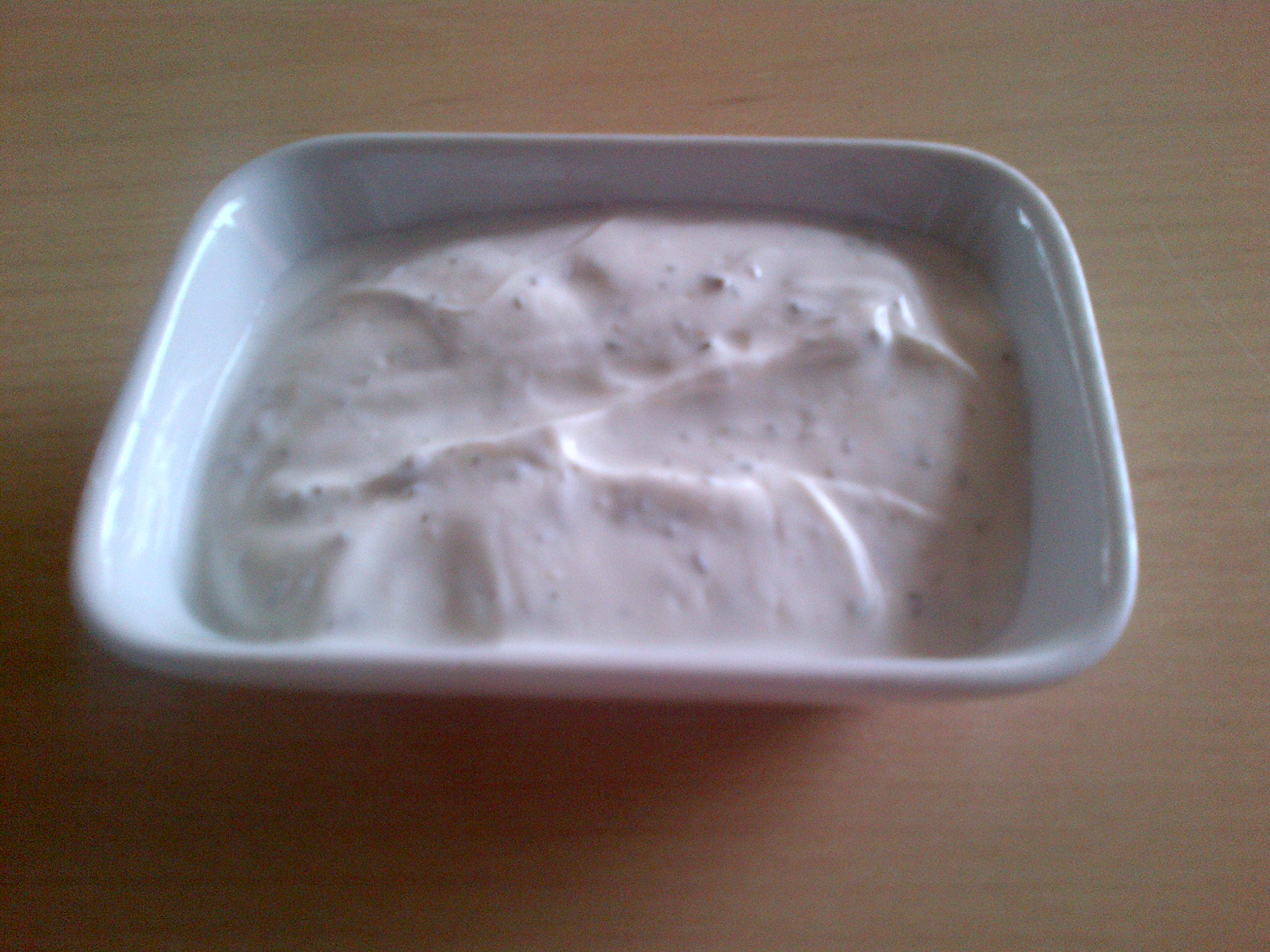 Haydari, un "meze" de la cocina turca.